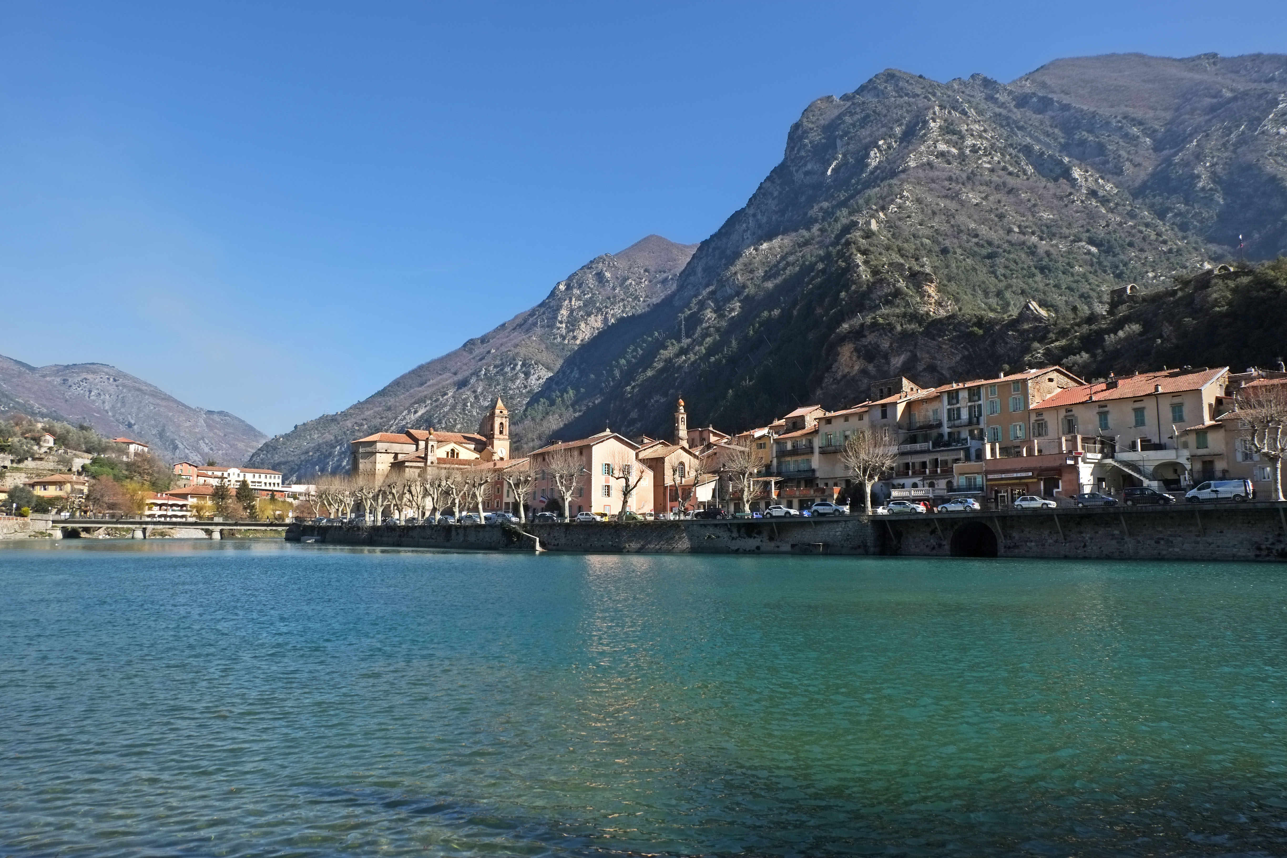 Vue du village de Breil-sur-Roya depuis la rive ouest du lac.